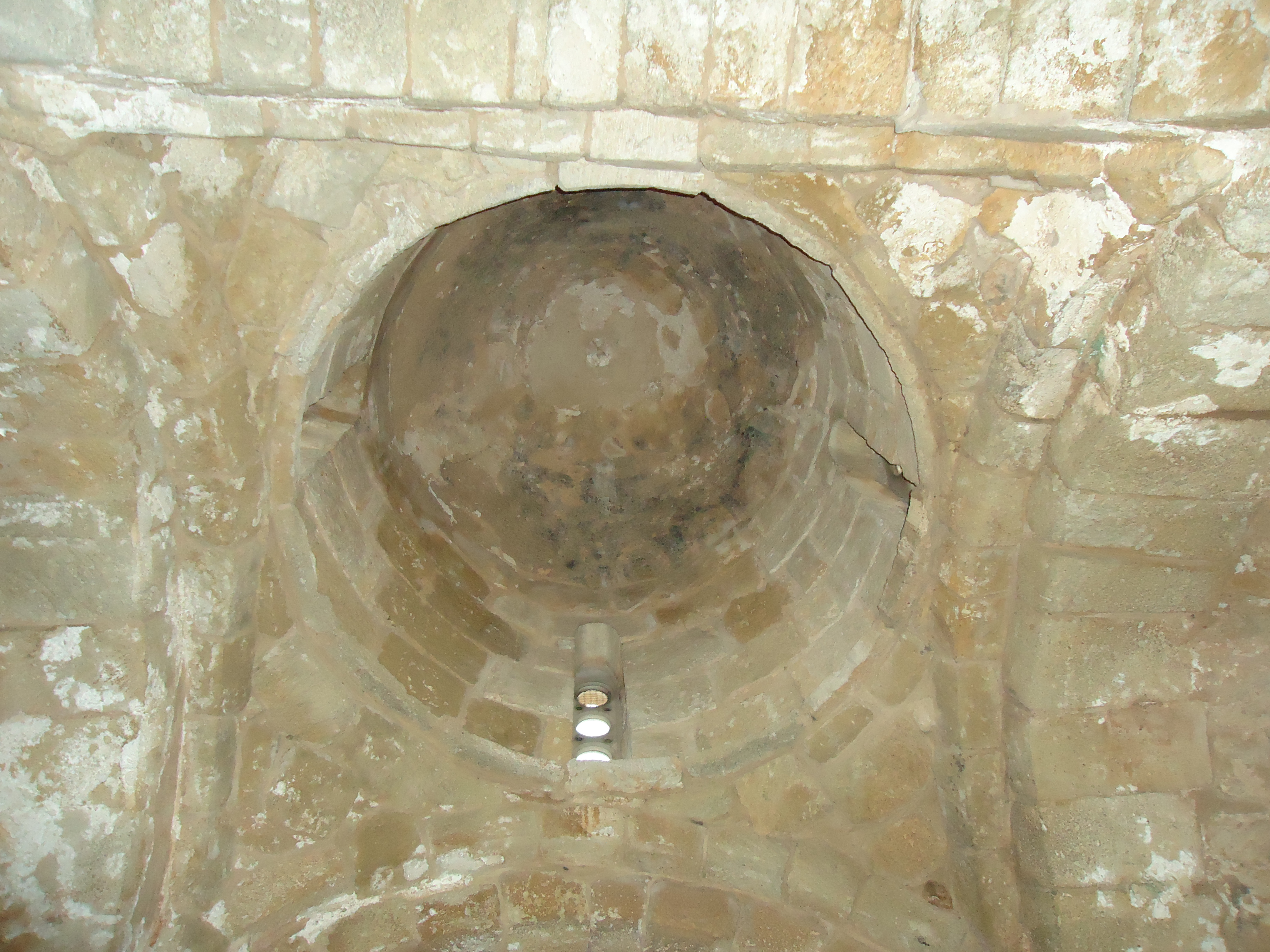 Ναός του αγίου Ανδρονίκου, το εσωτερικό του ναού